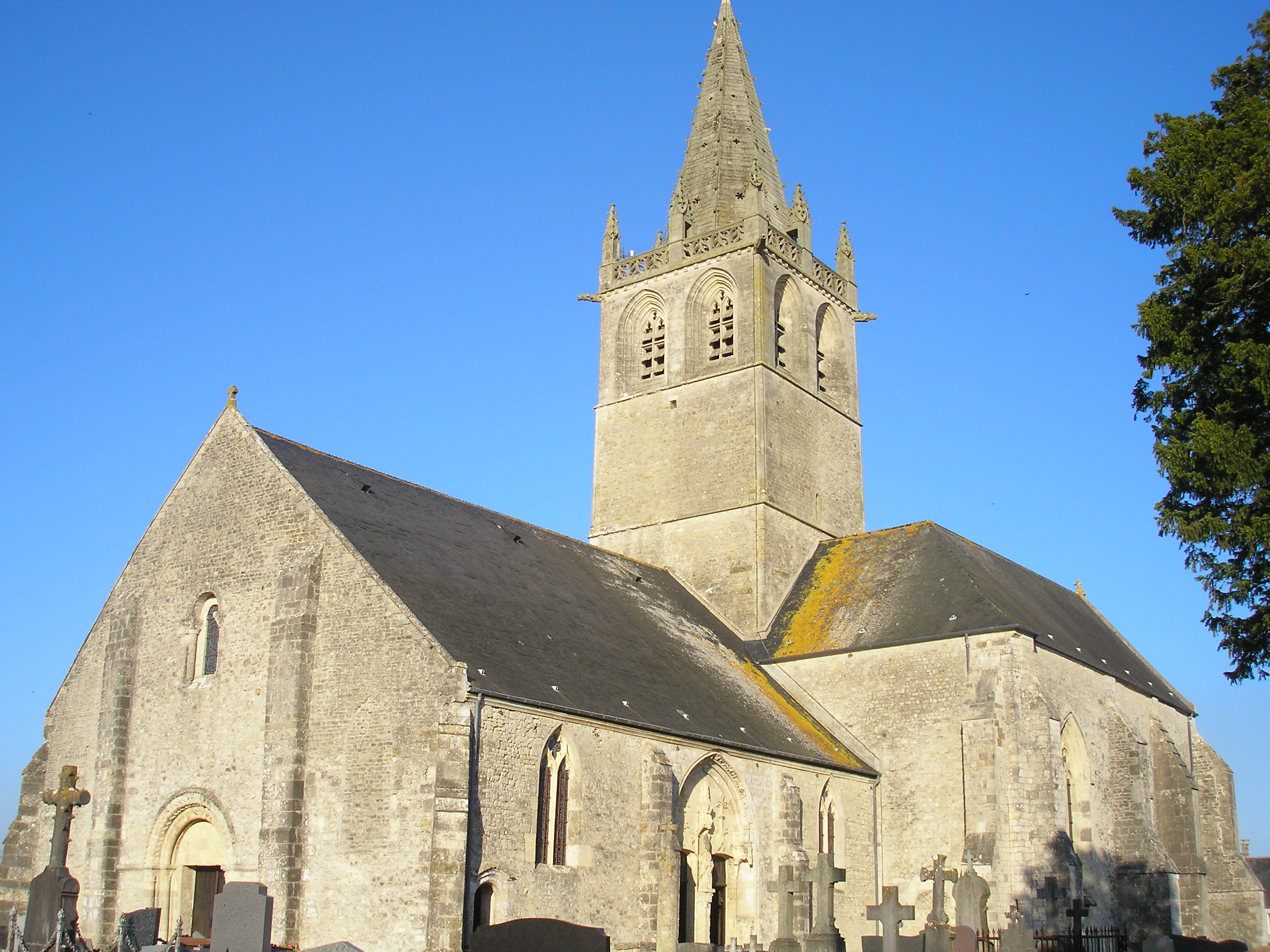 Saint-Côme-du-Mont (Normandie, France). L'église Saint-Côme-et-Saint-Damien.